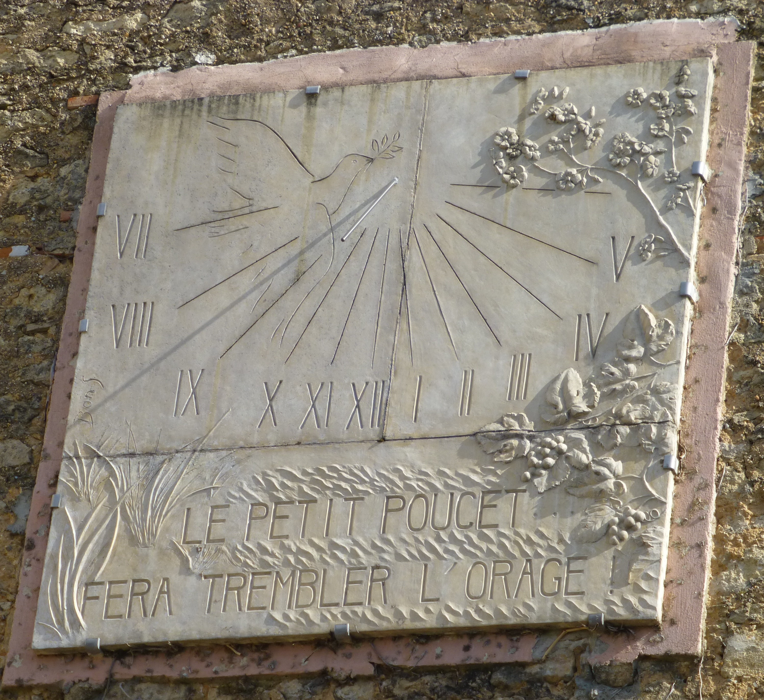 Saint-Pierre-d'Aurillac, cadran solaire légendé : Le Petit Poucet fera trembler l'orage.